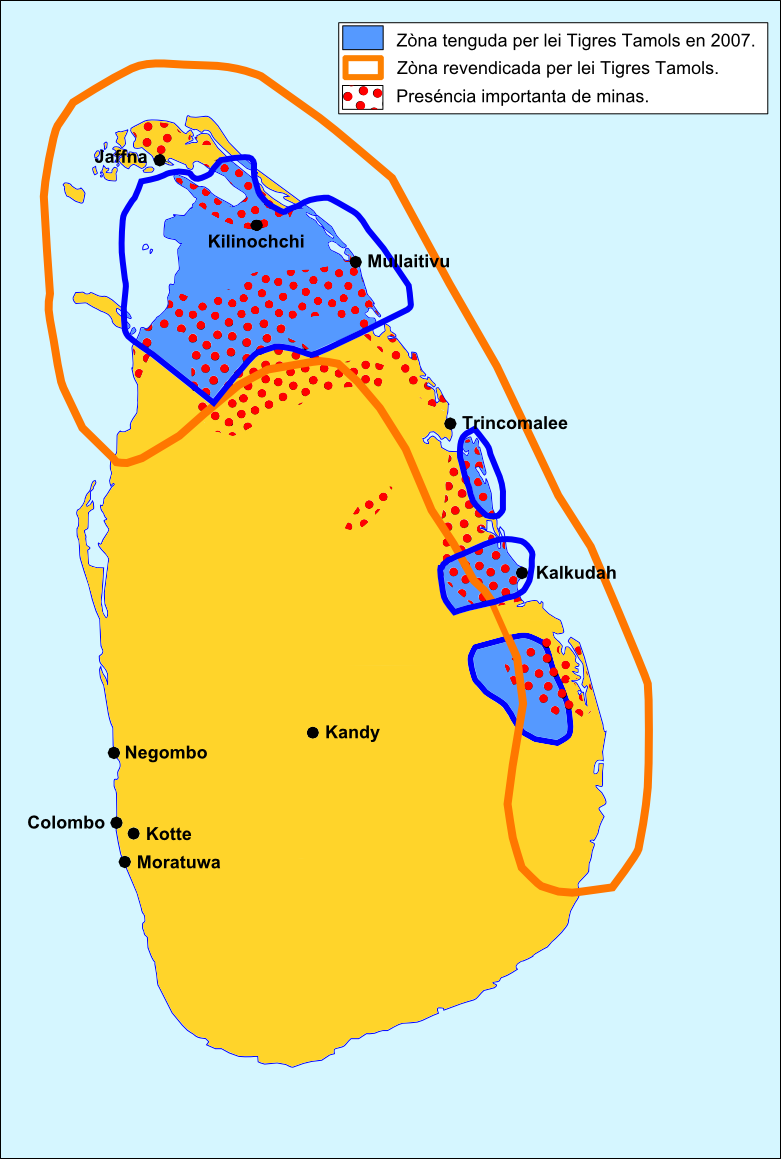 Guèrra Civila Srilankesa en 2007.